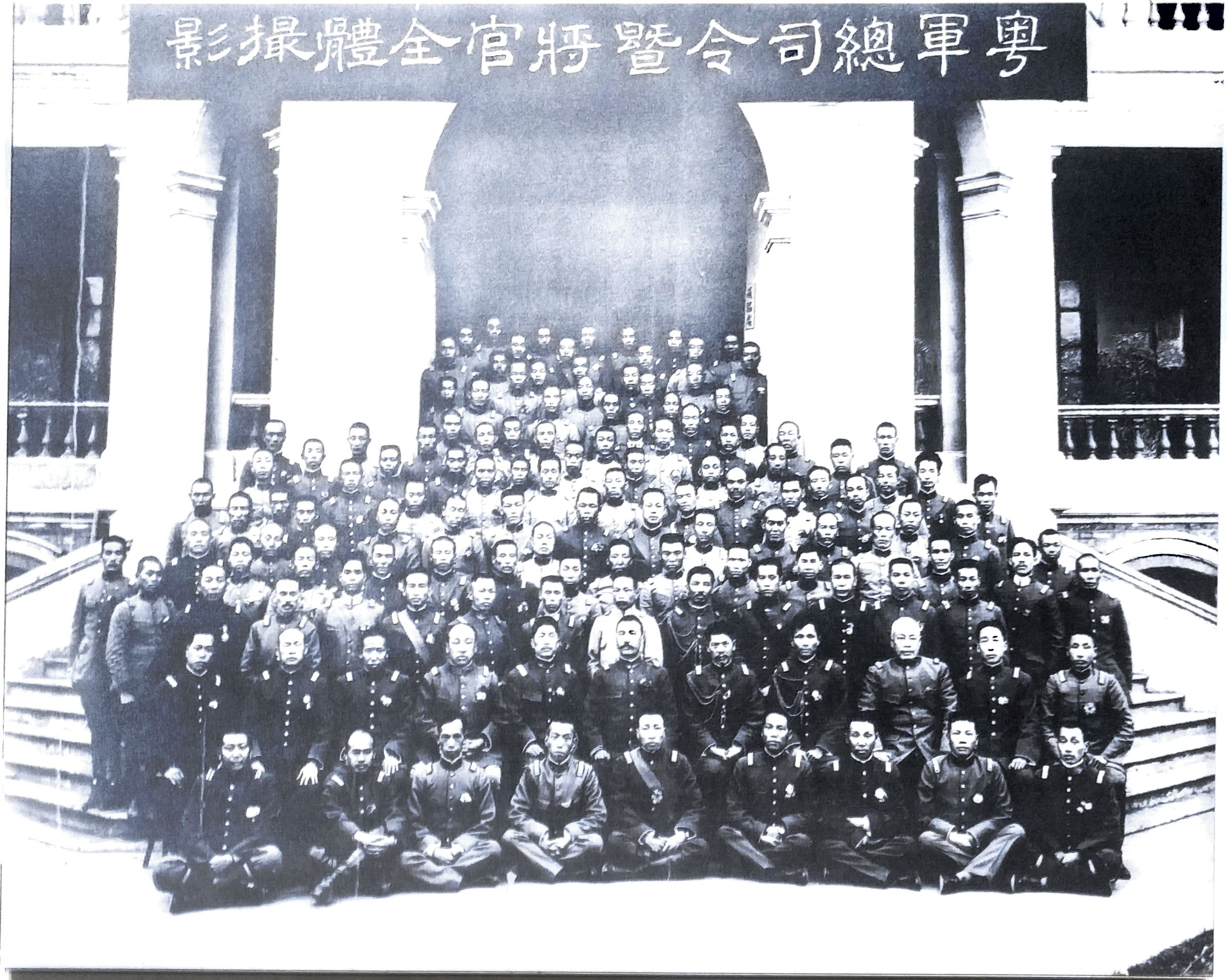 粤军将官汕头合影